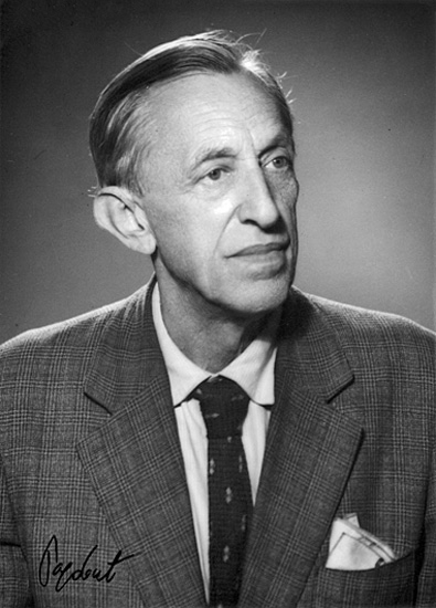 Ivan Radović